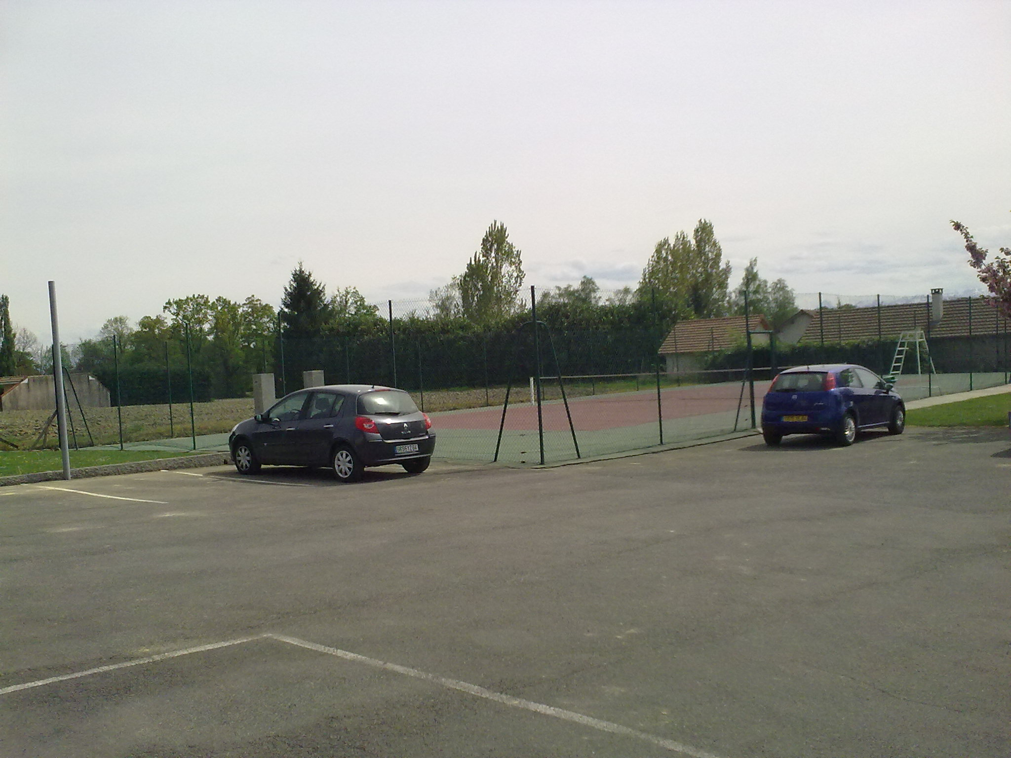 Uzein France Europe